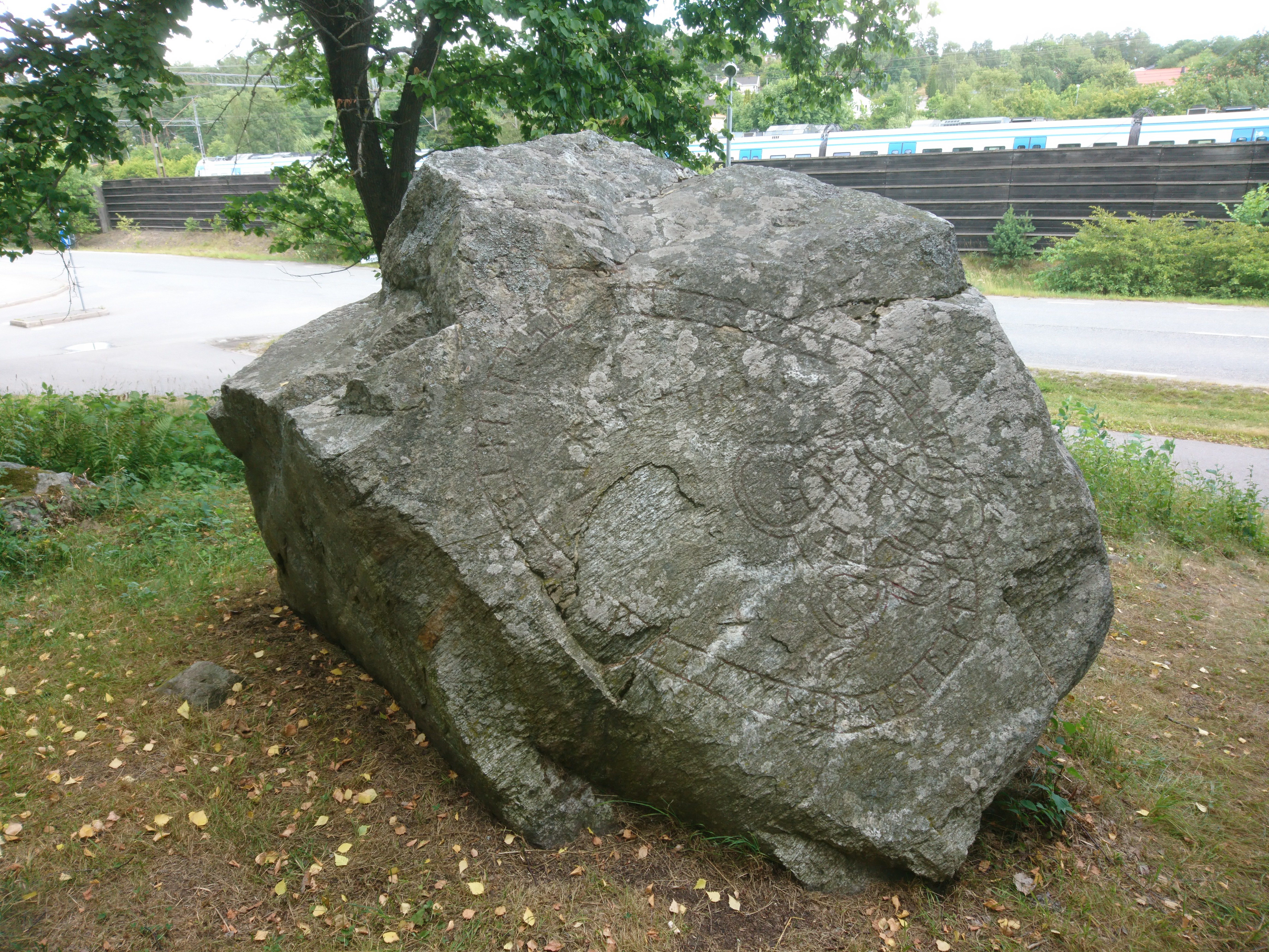 Upplands runskrifter 114 - Runristningar från 1000-talet i Upplands Väsby. Också kallad Ladbrostenen.